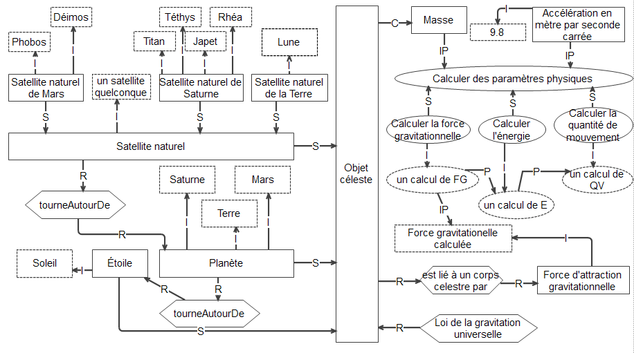 Mot un modèle exemple l'objet celeste